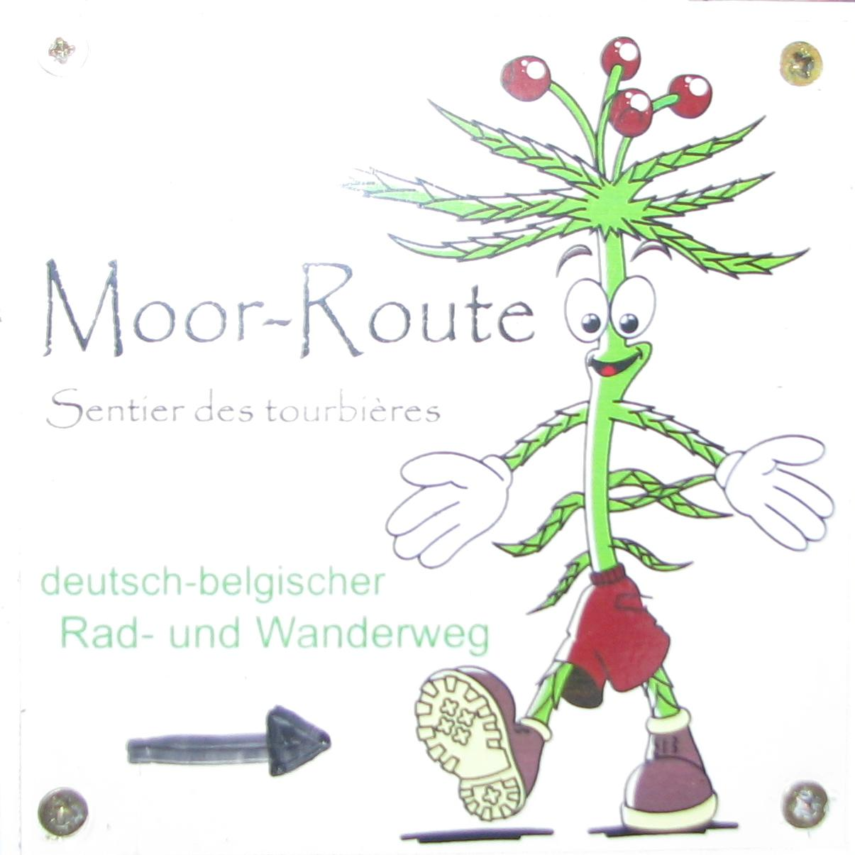 Schild der Moor-Route, eines Themenwanderweges durch den Naturpark Nordeifel